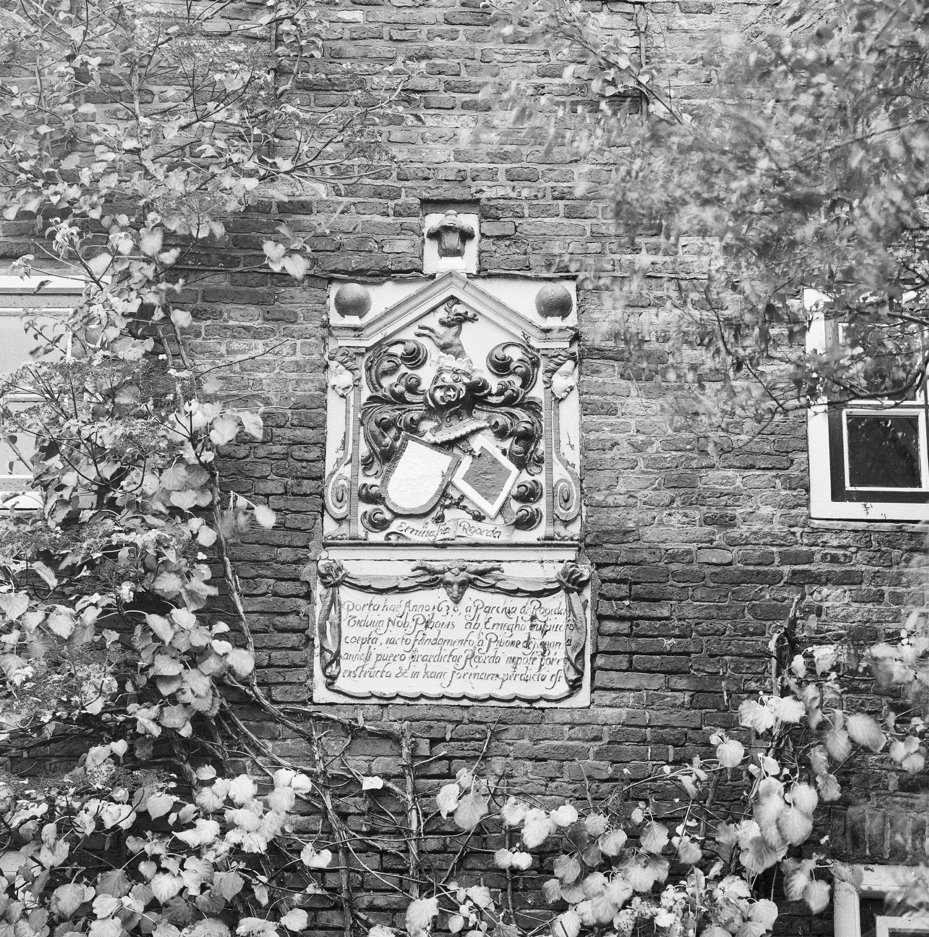 Exterieur VOORGEVEL, GEVELSTEEN (VOOR DE SLOOP)